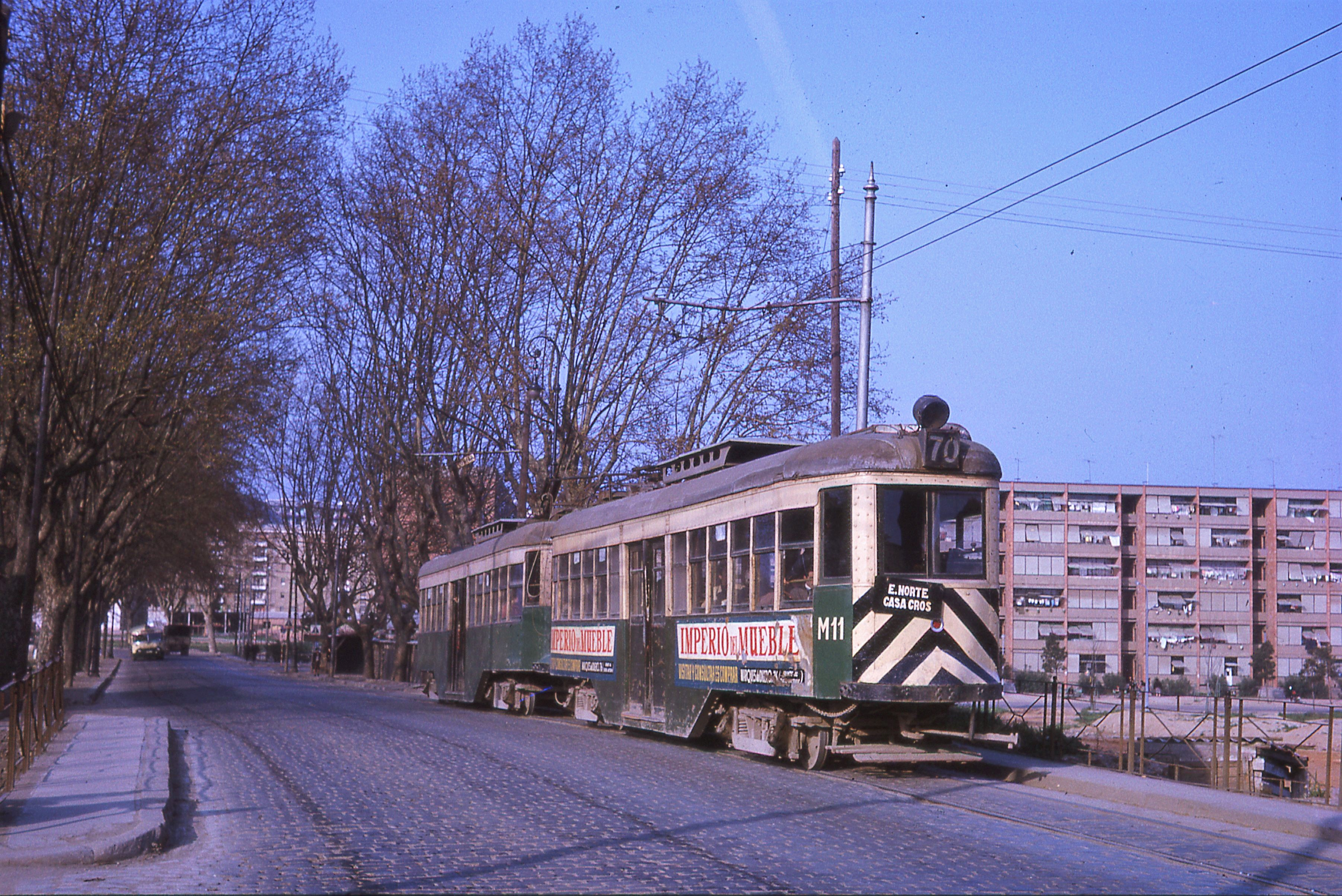 La composición de tranvías formada por el coche motor M11 y el remolque R11 de Urbanizaciones y Transportes, en la calle Pedro IV, confluencia con calle Maresme, prestando servicio en la línea 70 Pere IV.